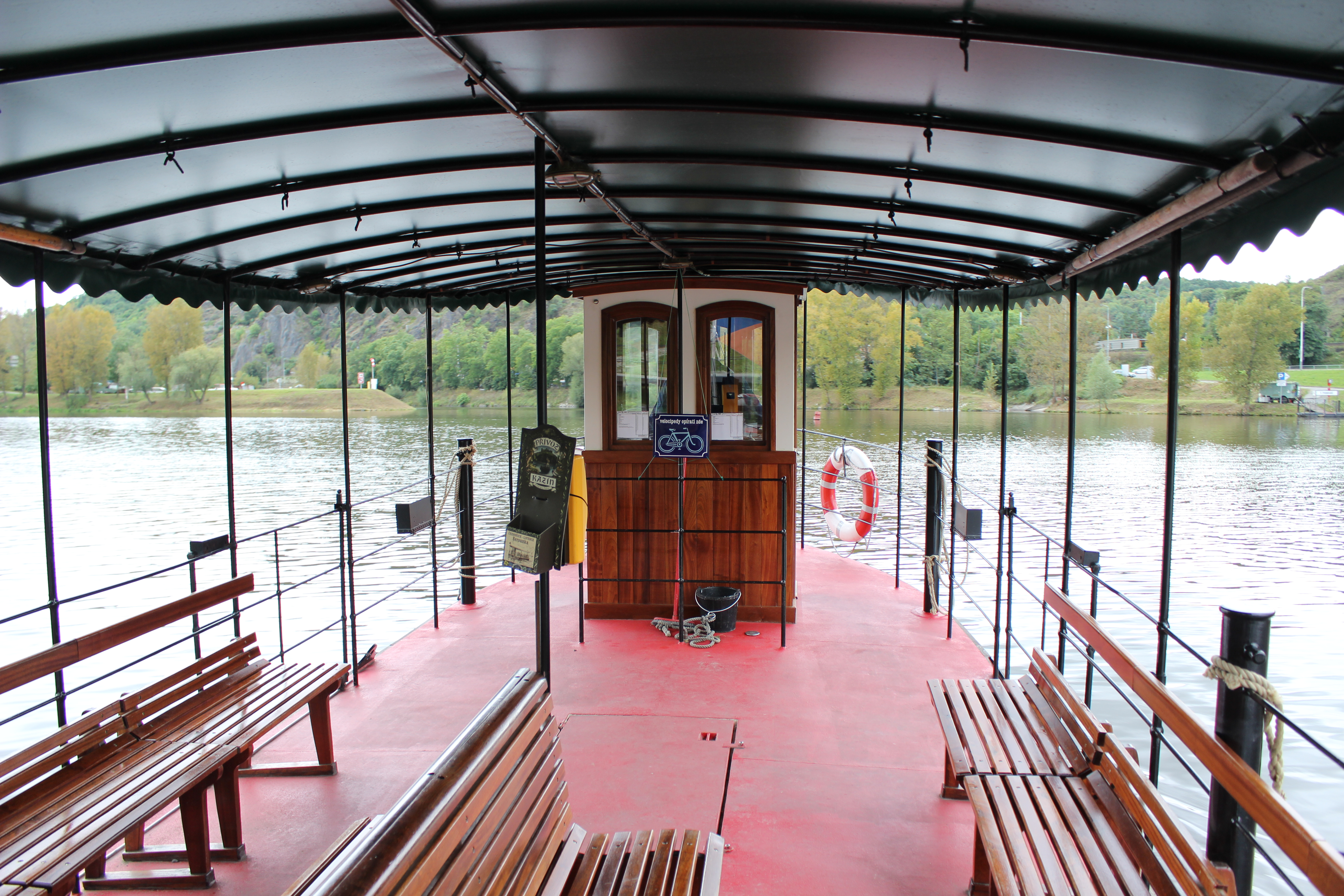 Plavidlo Baba na přívozu v pražském Podhoří.